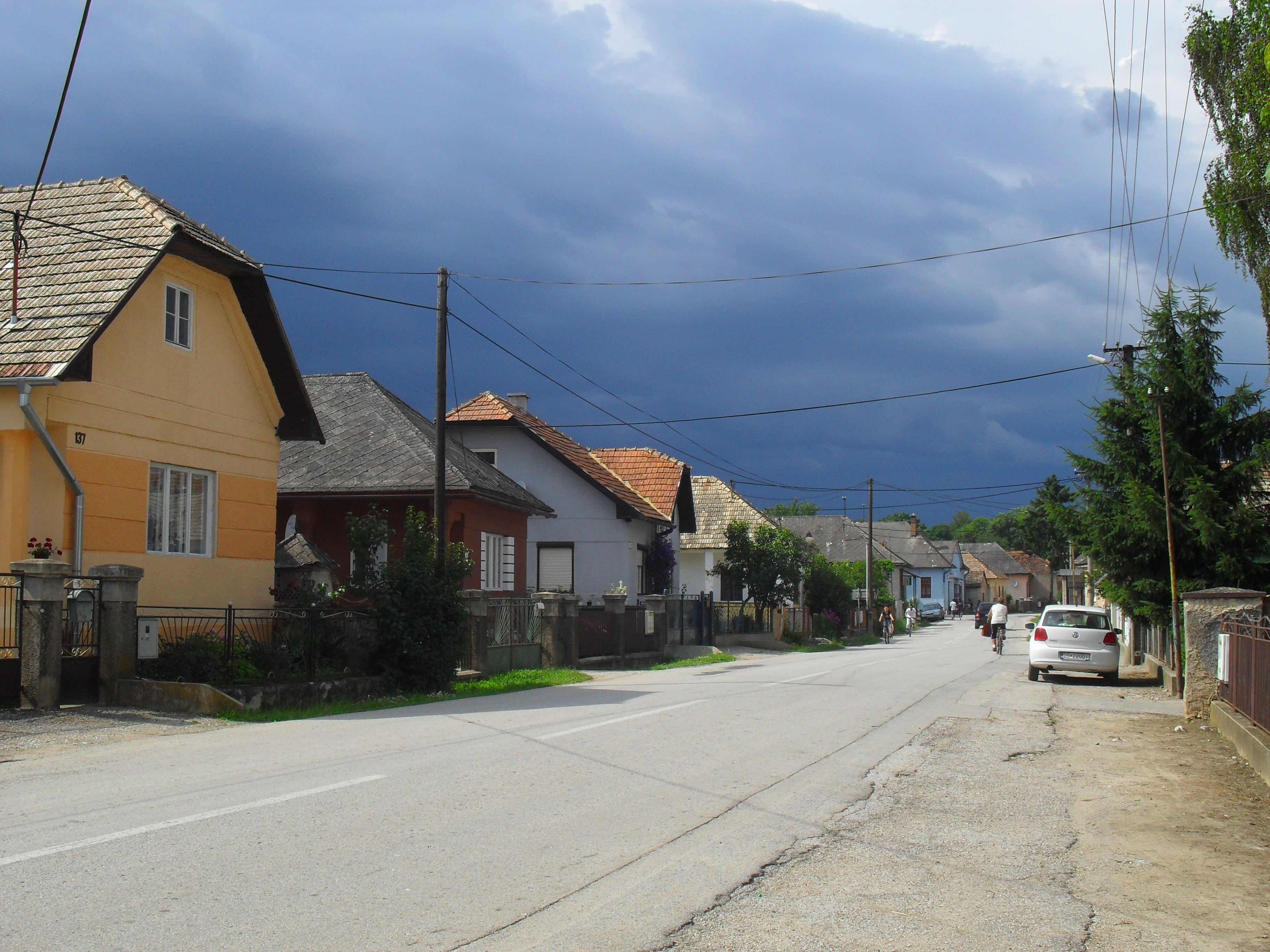 Lice - utcakép